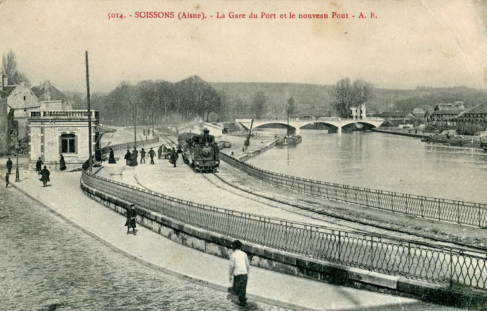 Carte postale ancienne éditée par AB, N° 5014SOISSONS : La gare du Port et le nouveau Pont.